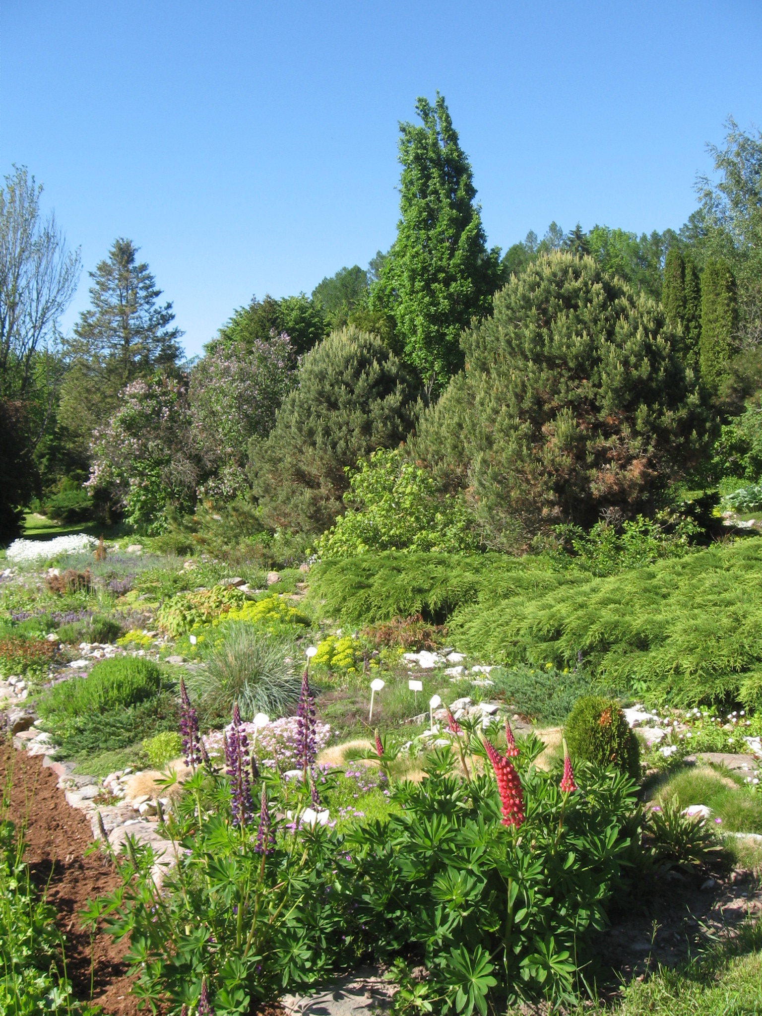 Luua arboretum.